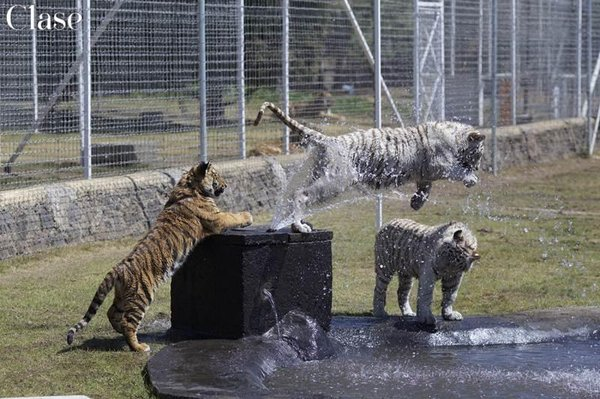 Tigers playing at The Black Jaguar White Tiger™ Foundation